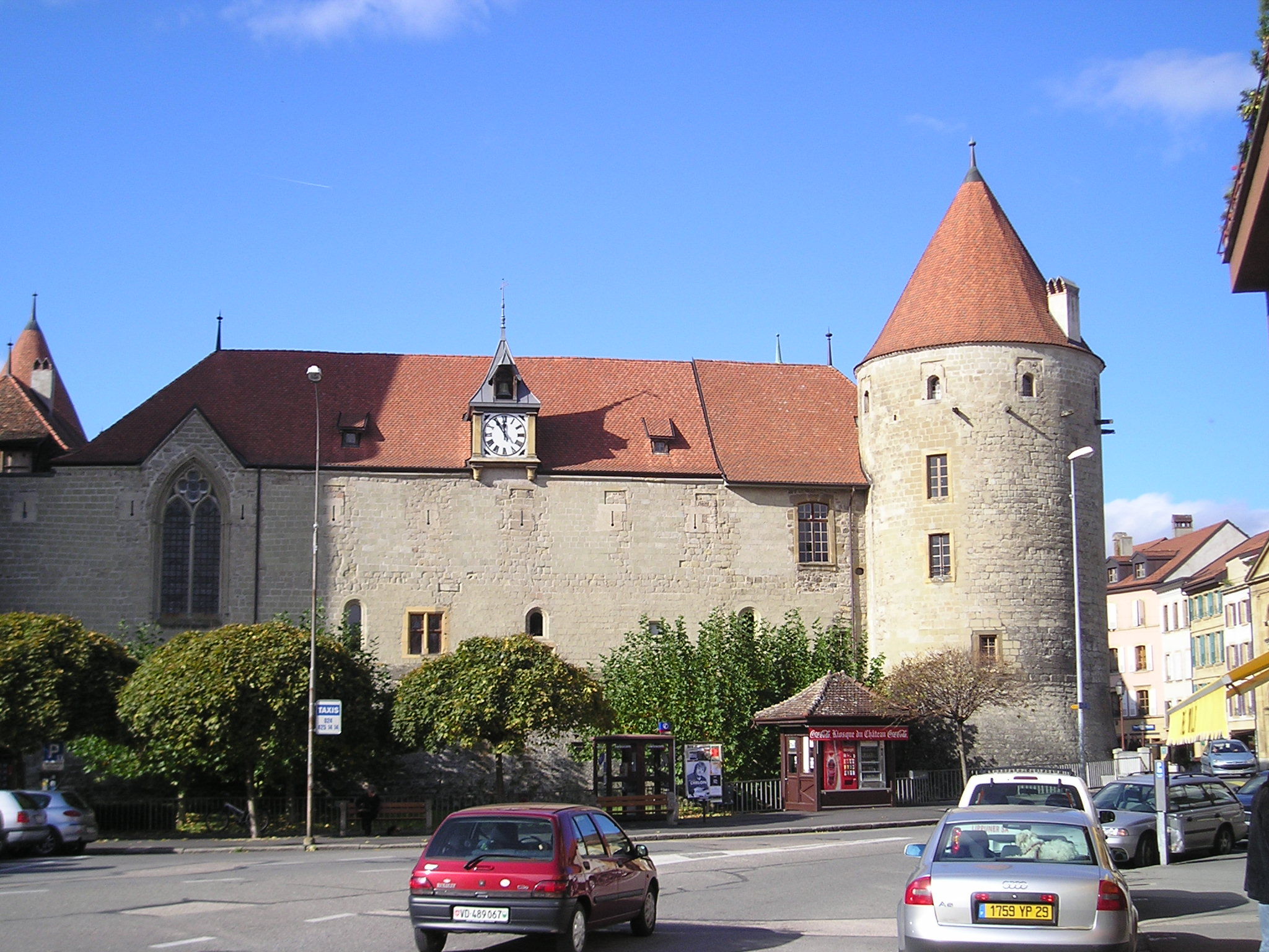 Castello di Yverdon (Svizzera), 1° novembre 2006, autore Massimo Macconi